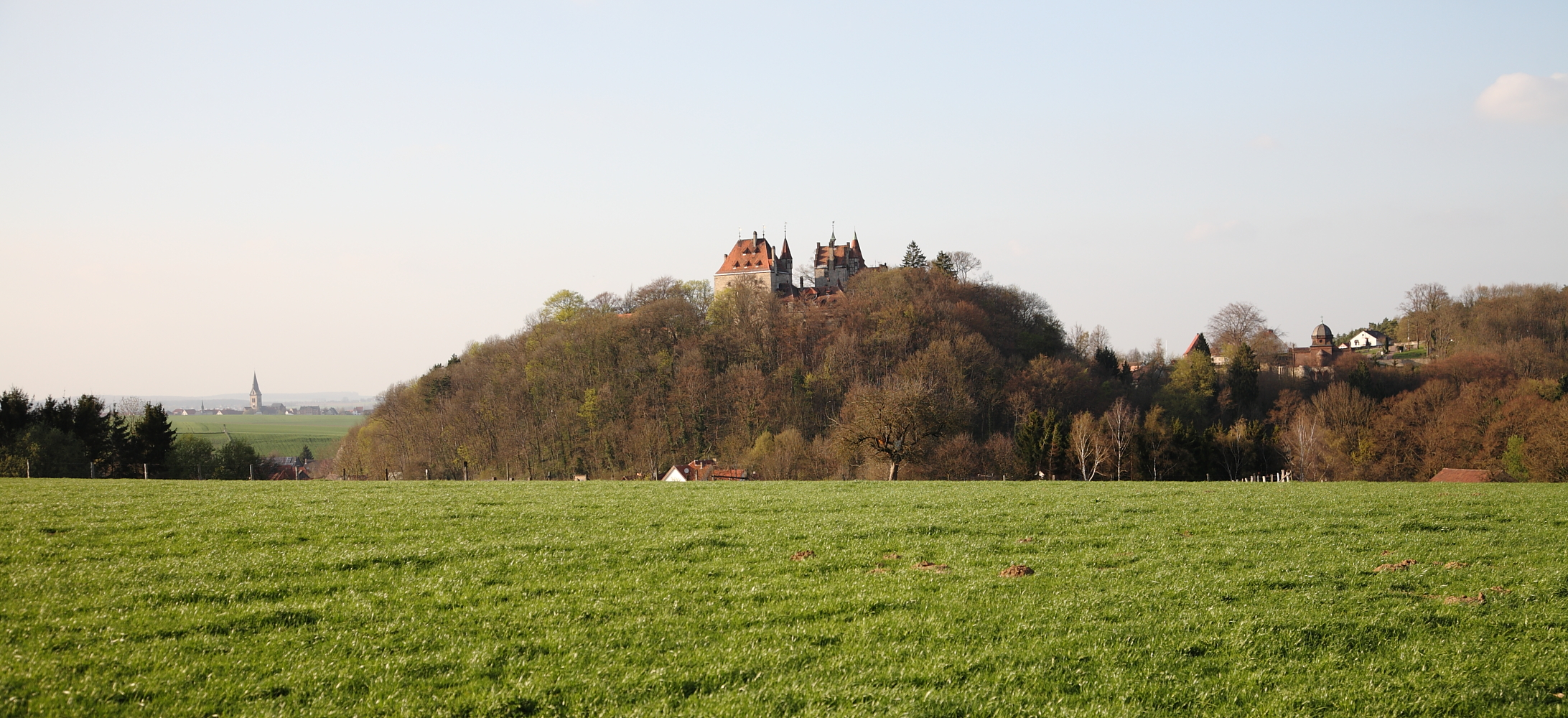 Die Höhenburg Calenberg erbaut im Jahre 1299 (links im Hintergrund die Neustadtkirche St. Johannes Baptist in Warburg erbaut im Jahre 1264)